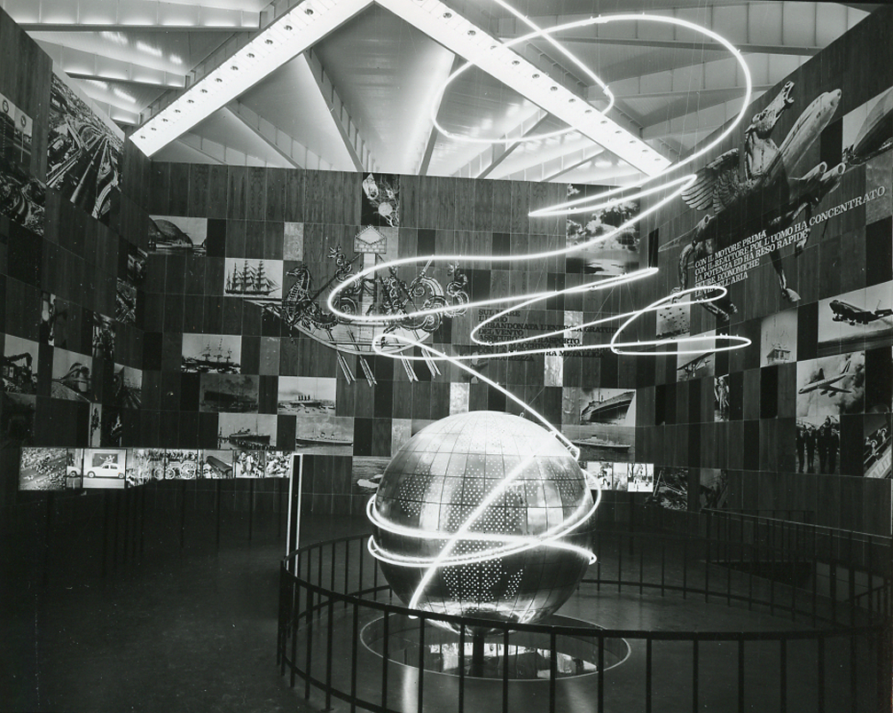 Servizio fotografico : Torino, 1961 / Paolo Monti. - Fototipi: 2 : Positivo b/n, gelatina bromuro d'argento/ carta, provino a contatto da pellicola 10x12. - ((Serie costituita da 2 provini a contatto senza numerazione. La suddetta serie è contenuta nella scatola dei contatti identificata con il n. 147; sul coperchio iscrizione manoscritta a pennarello: "Contatti 7f.". - Occasione: Documentazione dell'esposizione internazionale Italia '61 tenutasi a Torino in occasione del centenario dell'unità d'Italia